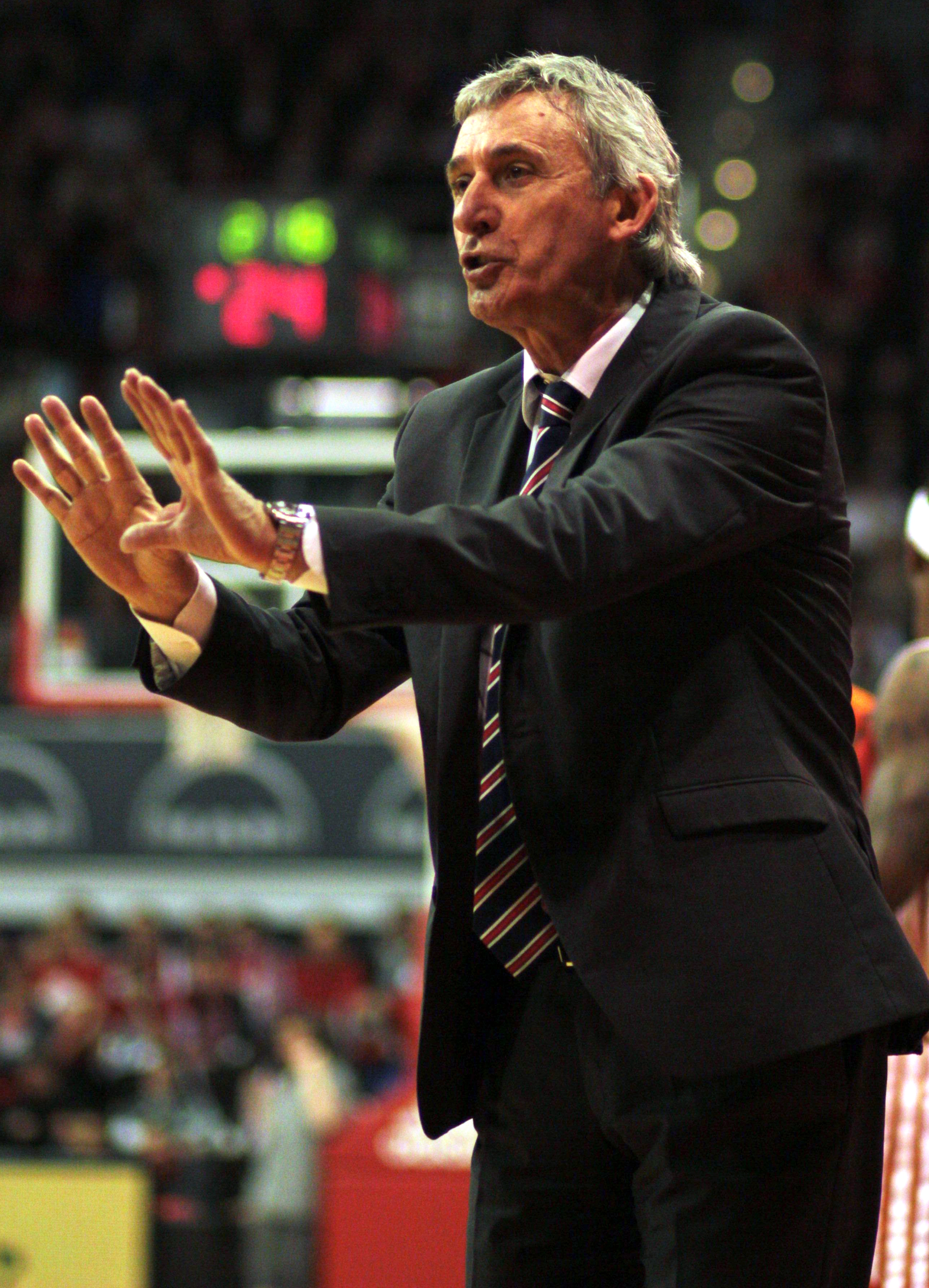 Svetislav Pesic beim Spiel des FC Bayern Basketball gegen Brose Baskets Bamberg